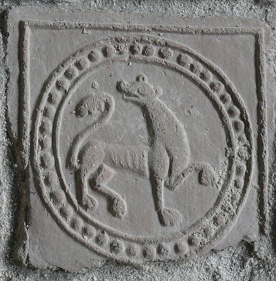 Dlaždice